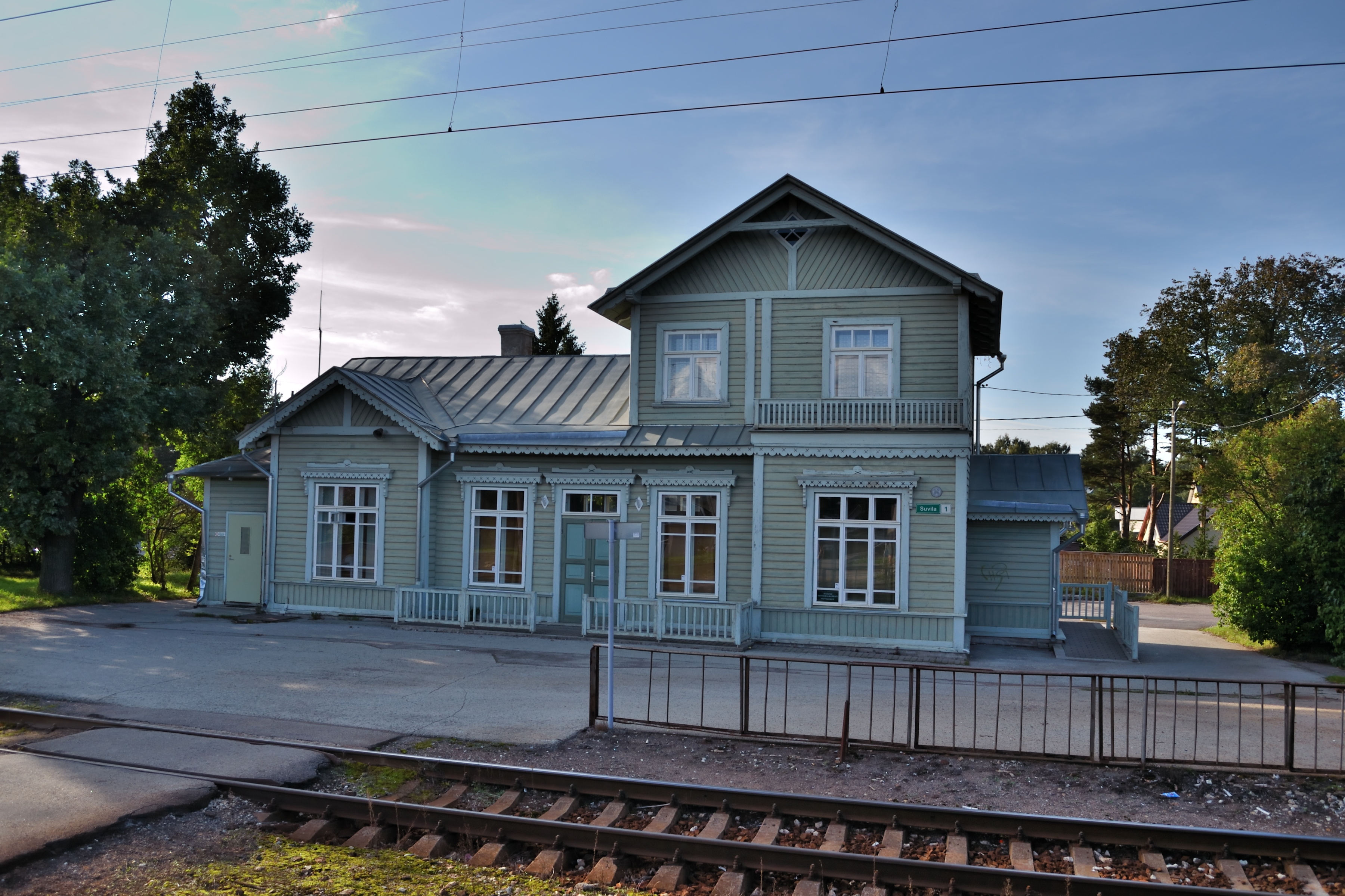 Tallinn, Pääsküla jaamahoone, 1916